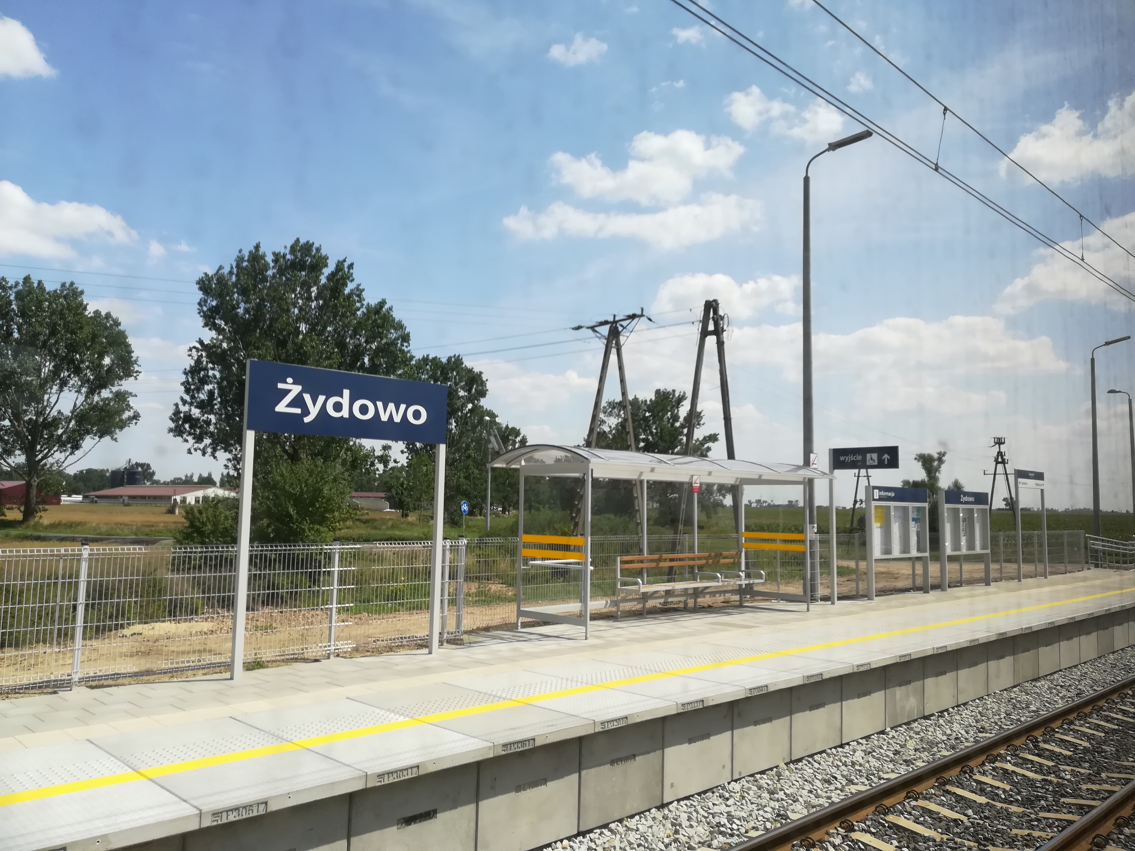 Peron przystanku kolejowego Żydowo.